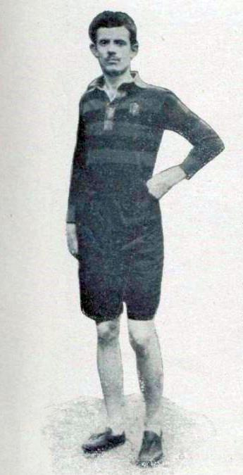 Adolphe Klingelhoeffer, en novembre 1899 (vainqueur du Prix de France)